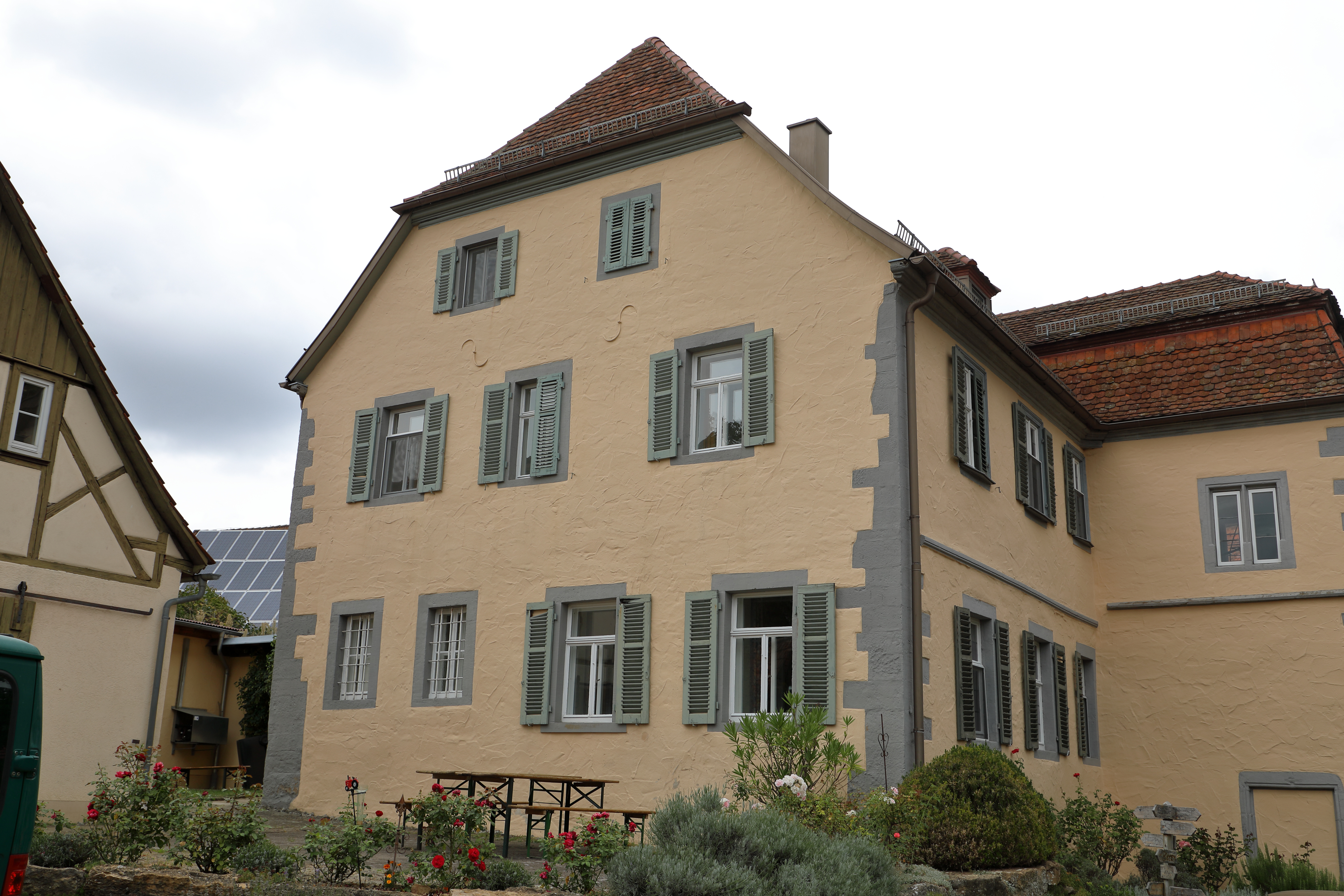 Der "Schulbauernhof Pfitzingen" ist eine Bildungseinrichtung des Landes Baden-Württemberg. Er ist u.a. in den denkmalgeschützten Gebäuden Pfitzingen 14 und Pfitzingen 41, dem "Schlösschen Pfitzingen" untergebracht.